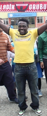 Simon Zenke'nin Samsun'da Okuyorum; Samsunspor'u Tutuyorum III etkinliğinde çekilmiş bir fotoğrafı.